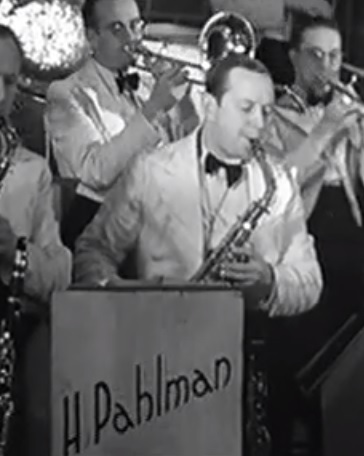 Helge Pahlman - saksofonista orkiestry tanecznej Dallape (1945)